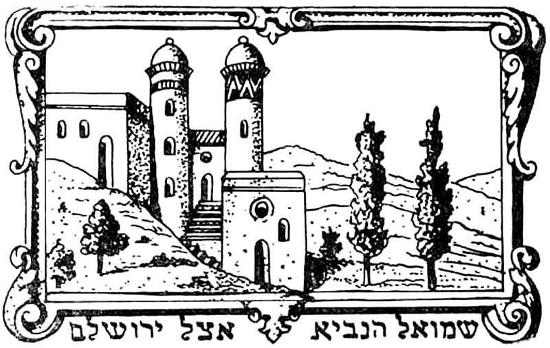 איור קבר שמואל הנביא משנת 1889